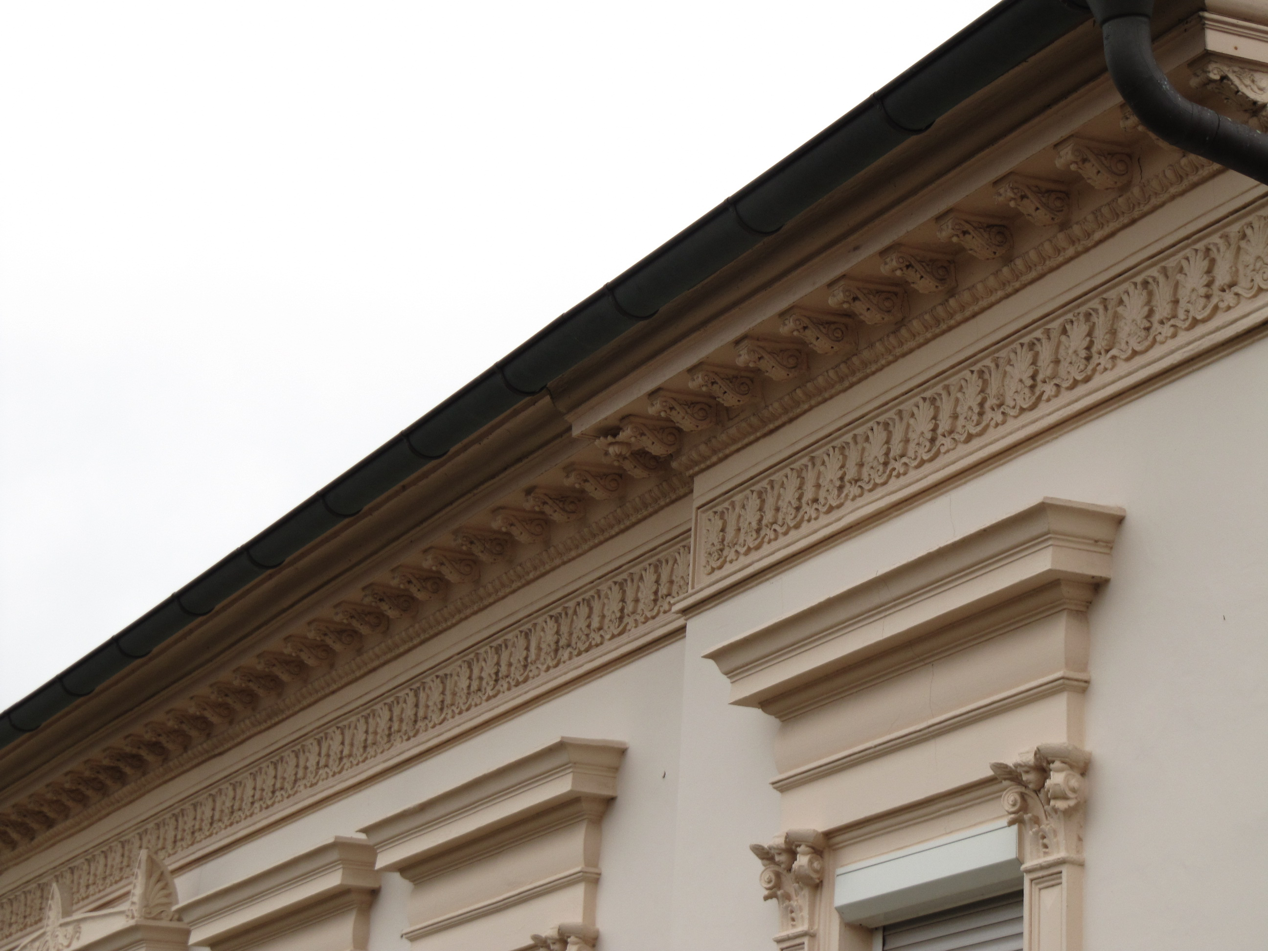 fries mit konsolen und traufgesims am gehöft fohrder hauptstraße 7